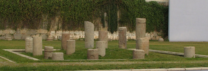 Marcos milenares romanos expostos no exterior do Museu regional D. Diogo de Sousa em Braga, Portugal.